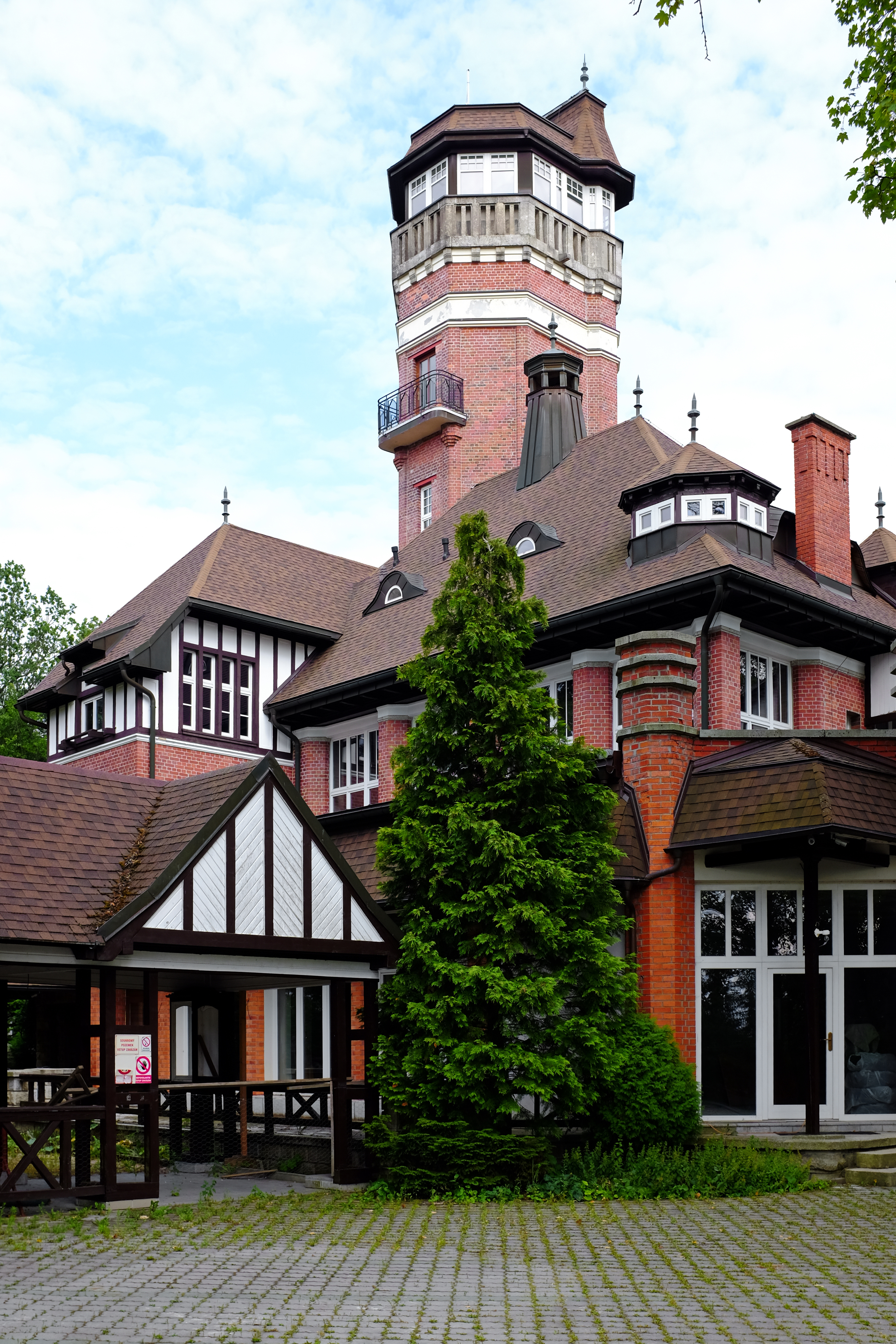 Doubí (Karlovy Vary), hora Aberg, rozhledna